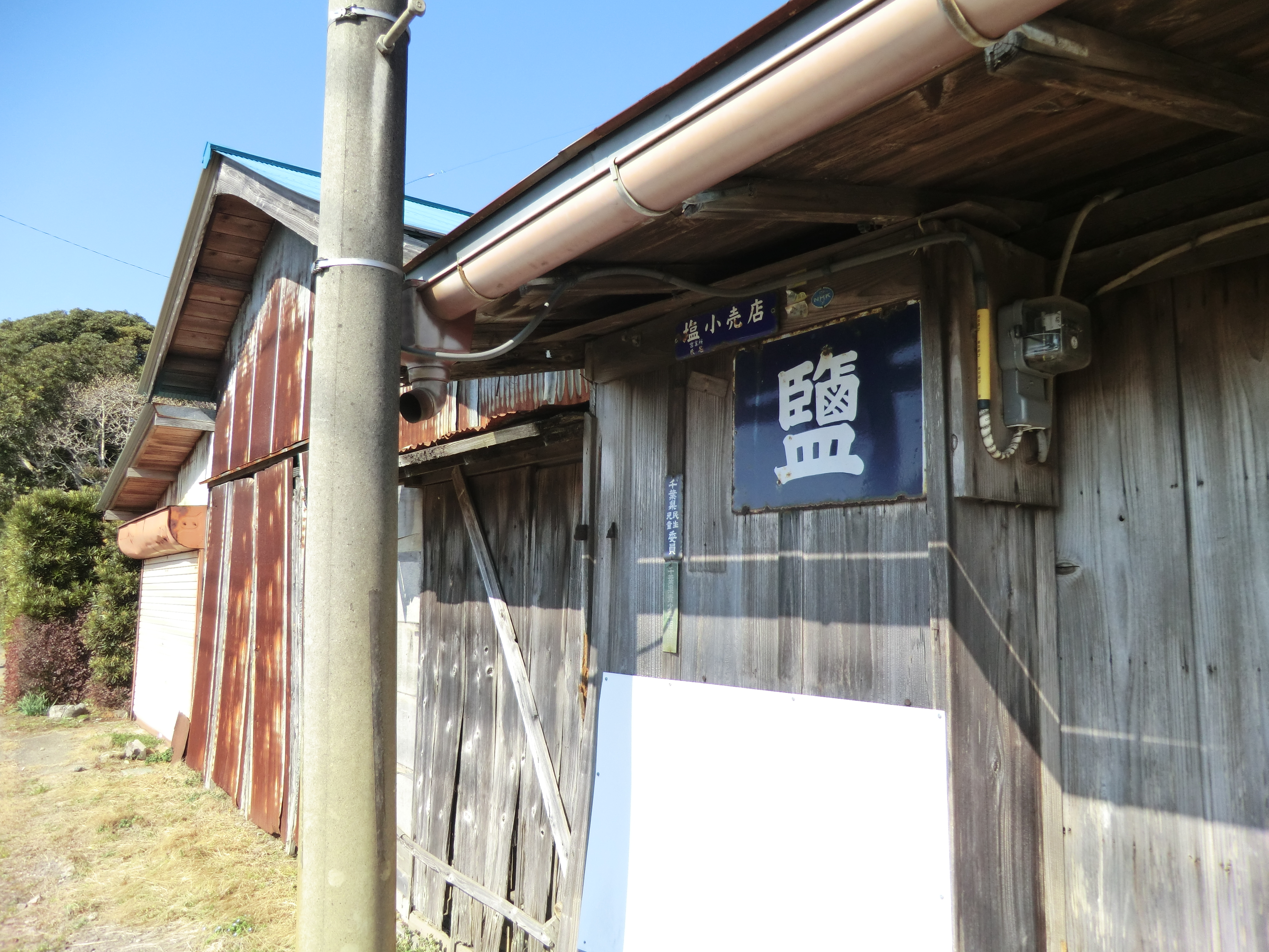 鹽（しお）